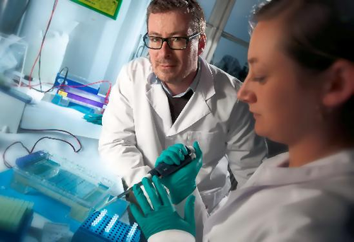 Eske Willerslev i laboratoriet